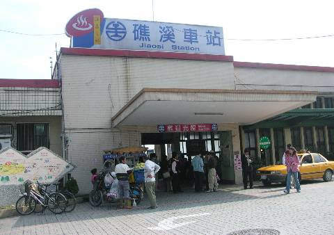 中文（台灣）: 臺鐵宜蘭縣礁溪車站。